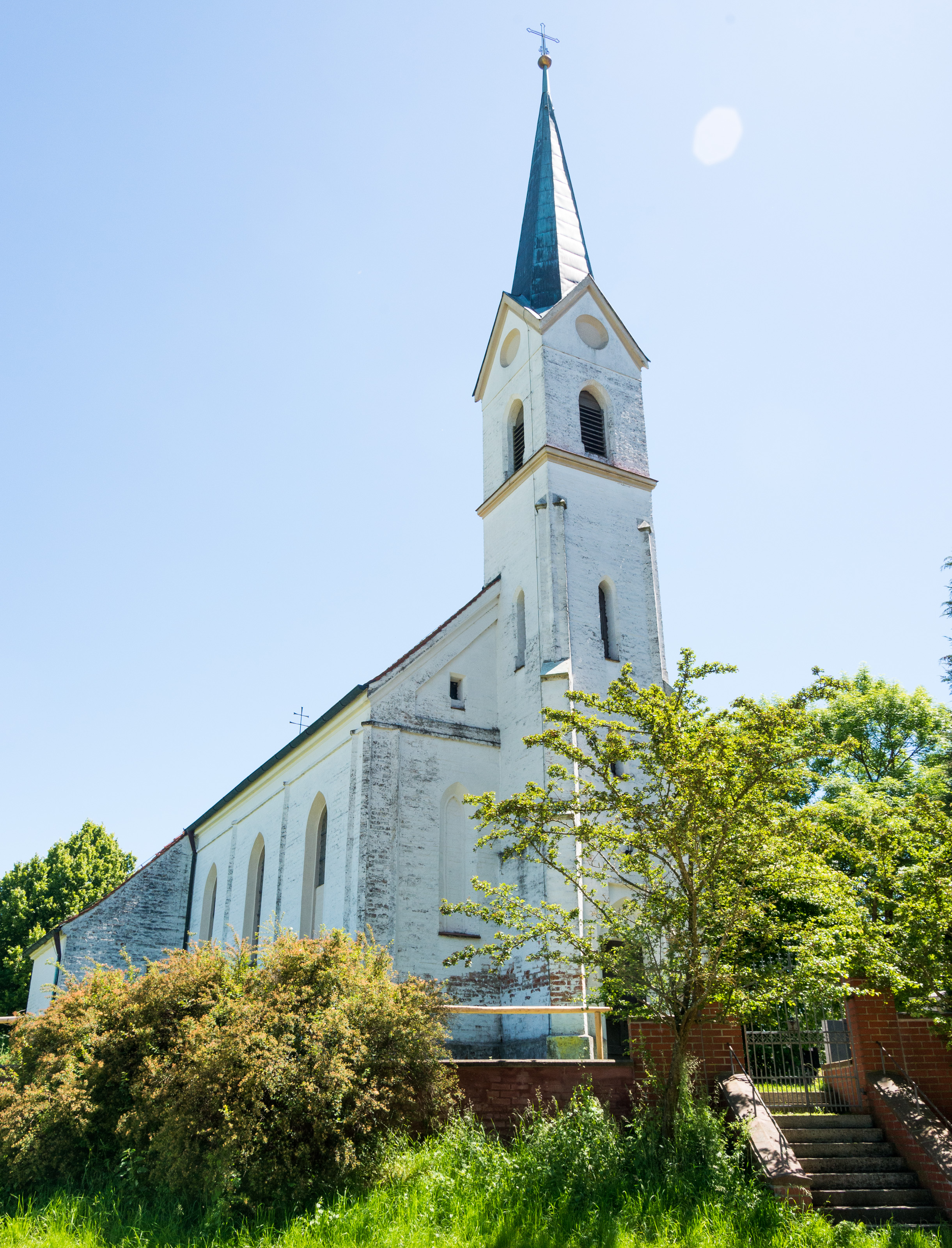 Katholische Kirche St. Benedikt: Saalkirche, Ziegelsteinbau, Chor spätgotisch, Ende 15. Jahrhundert, Langhaus und Turm neugotisch, Turm mit Spitzhelm, 1854; mit Ausstattung. This is a photograph of an architectural monument.